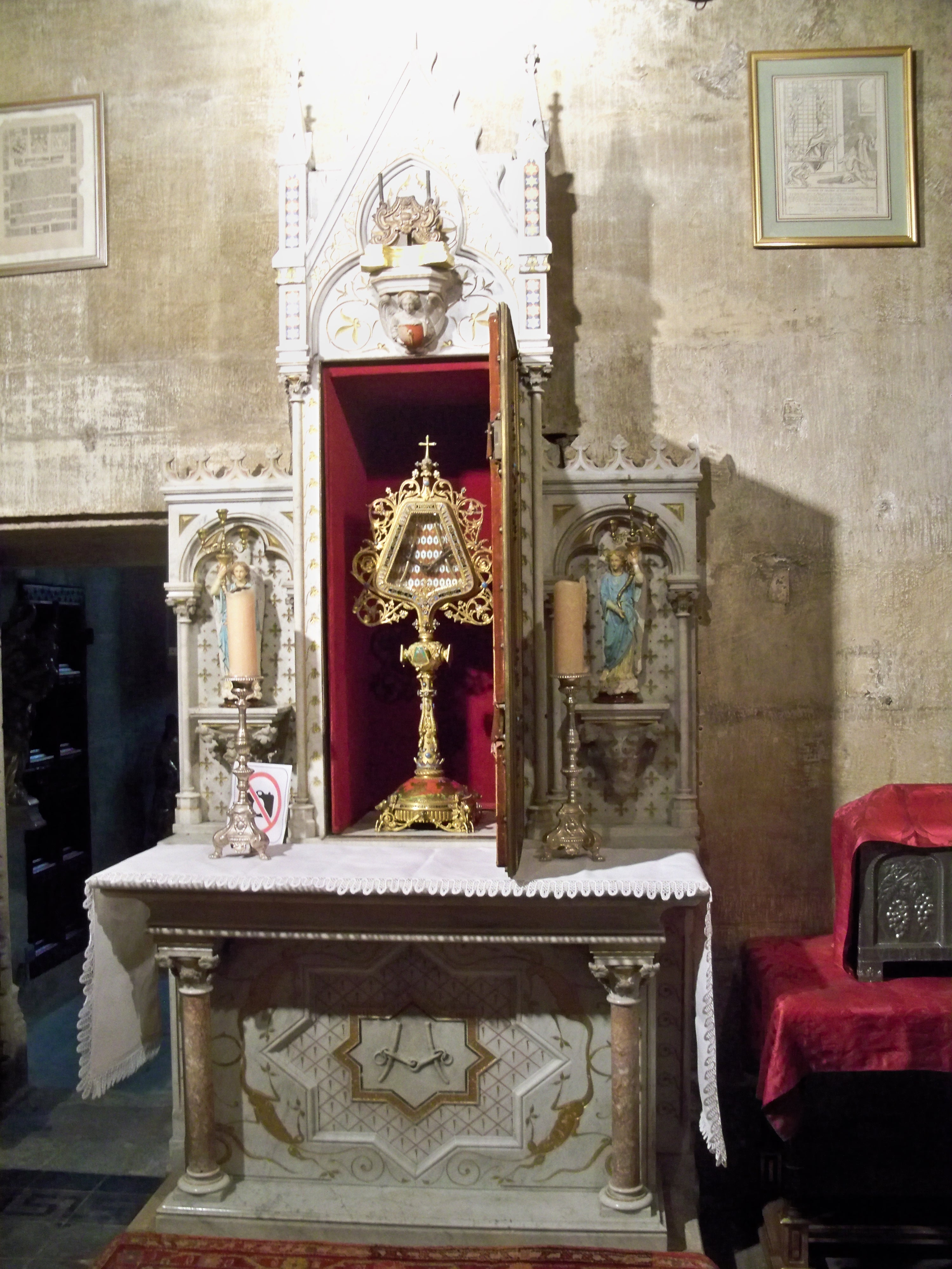 Autel de la Relique le Mors, Cathédrale Saint Siffrein de Carprentras, Vaucluse, France